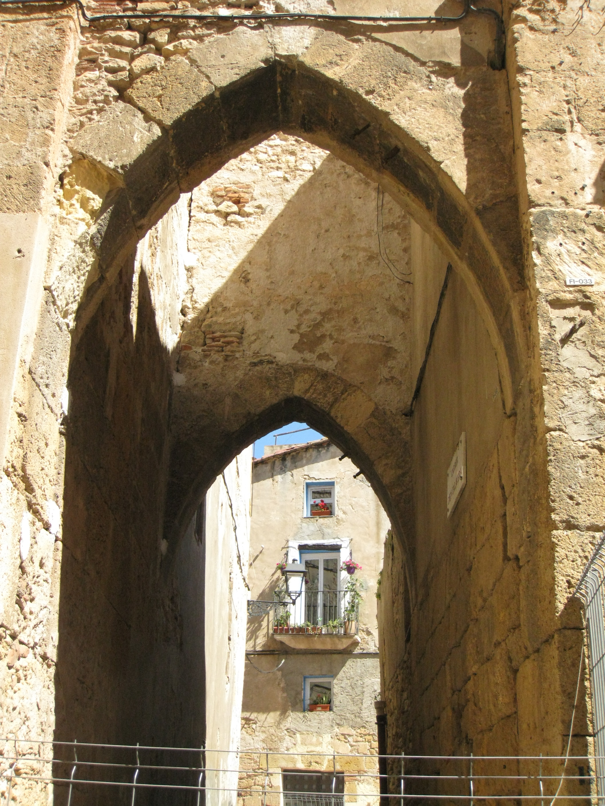 Barri jueu (Tarragona)